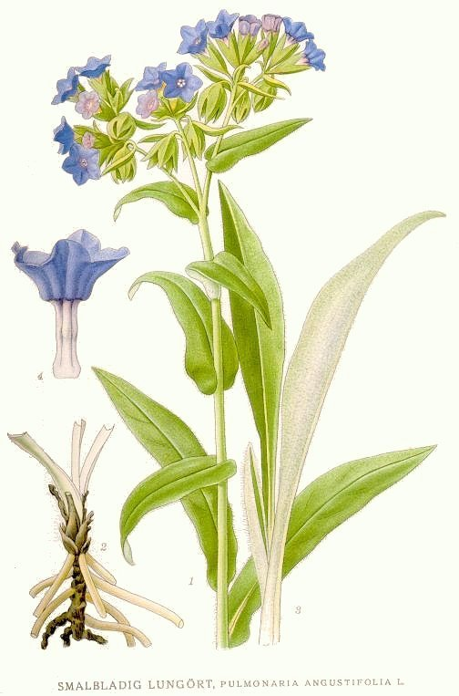 Original Description Smalbladig lungört, Pulmonaria angustifolia L.